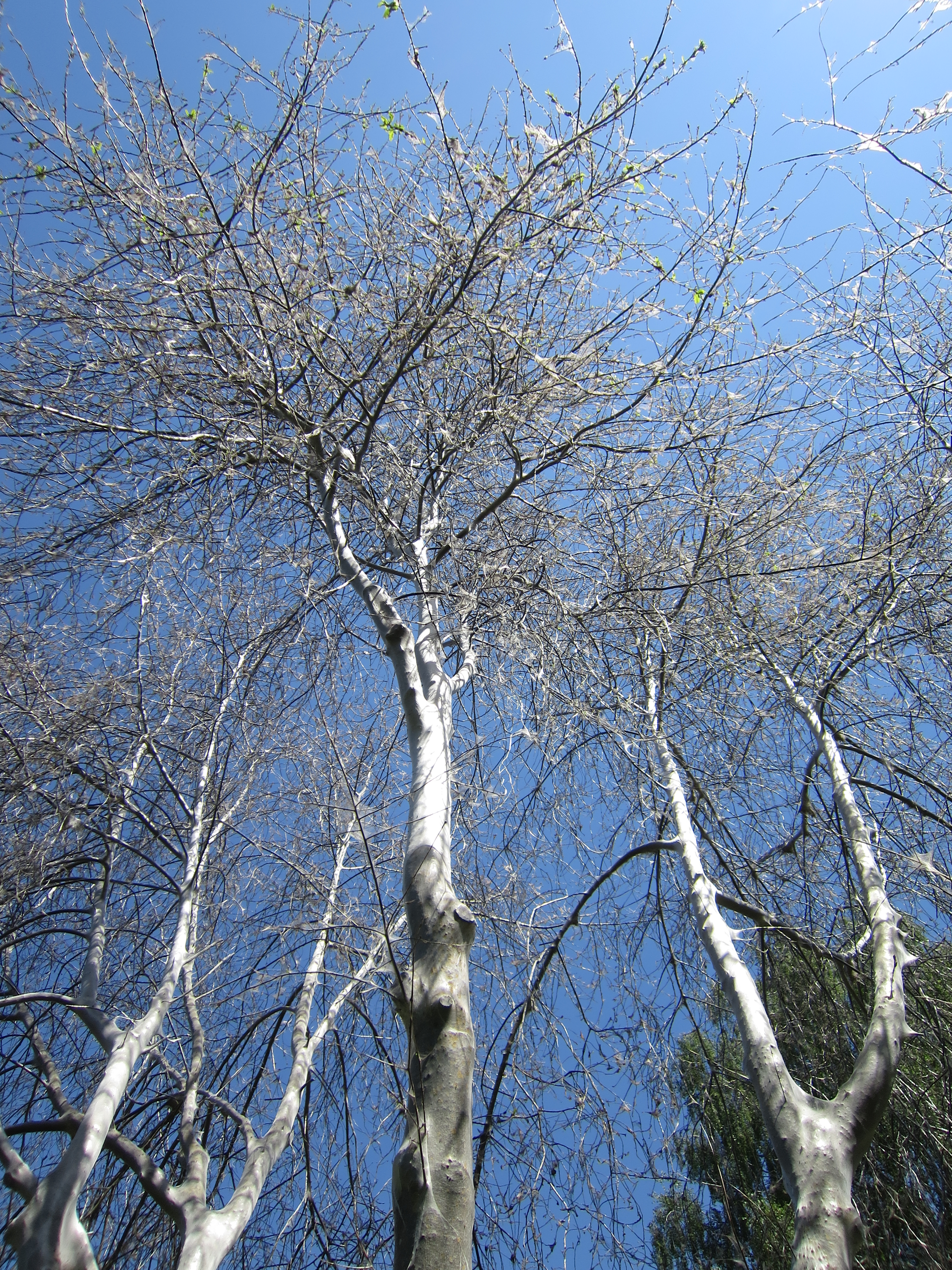 Savairojušās ievu tīklkodes postījumi Ziepniekkalnā